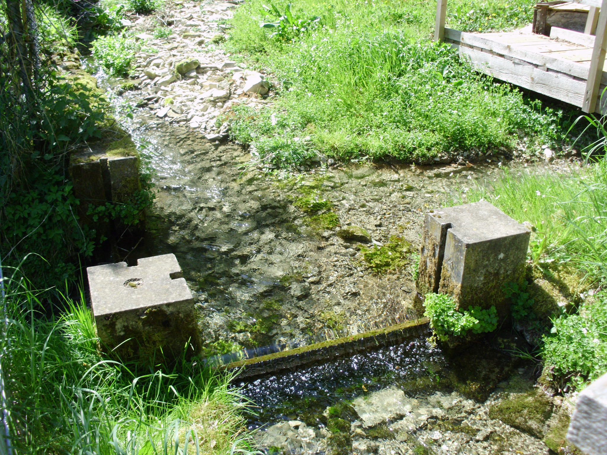 Erzwäschebach bei der Erzwäsche, einem Ortsteil der Marktgemeinde Titting im oberbayerischen Landkreis Eichstätt